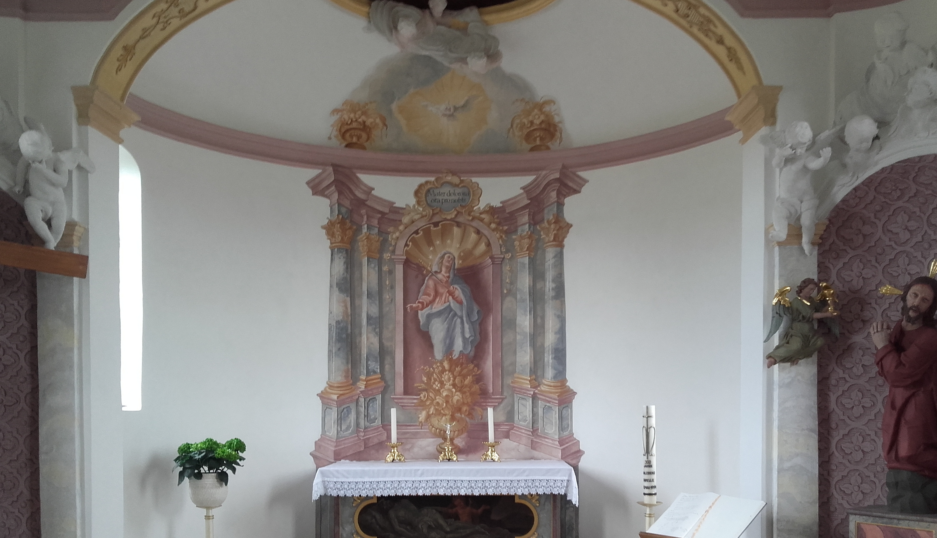 Salzbergkapelle Altargemälde